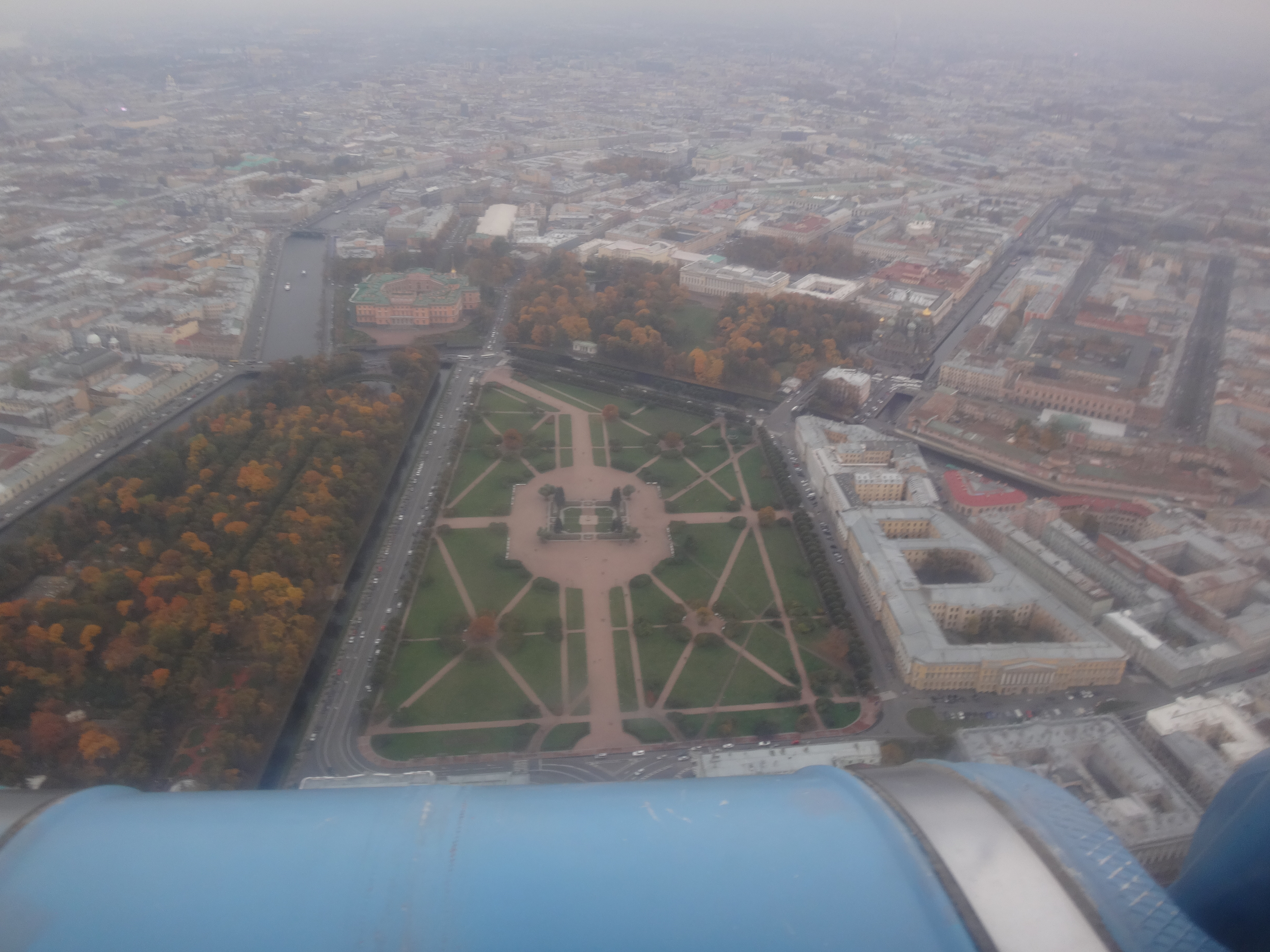 Марсово поле + Летний сад